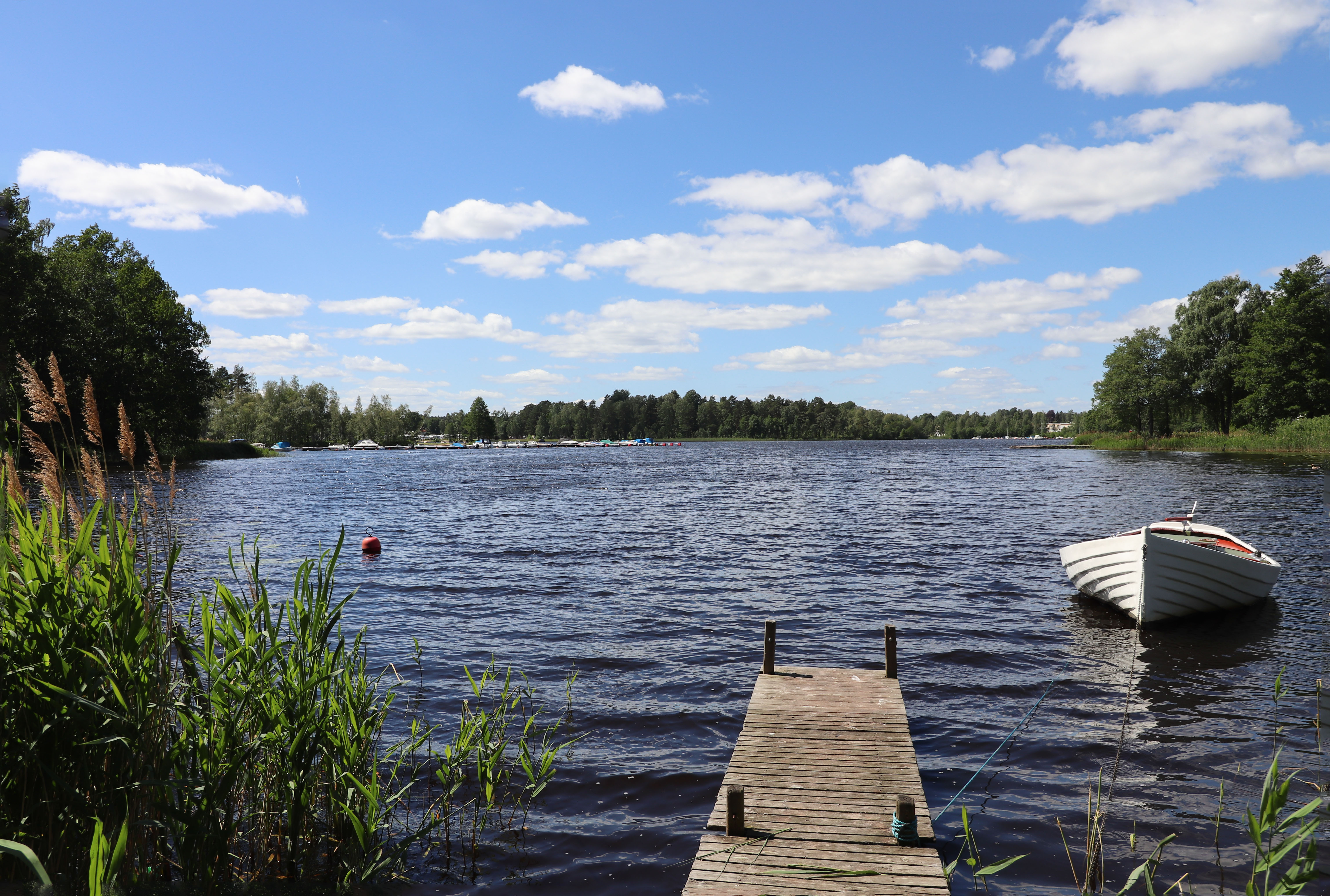 Sjön Rottnen i Hovmantorp,Småland vid Midsommar 2019.